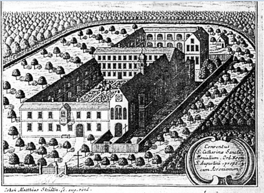 Kupferstich des ehemaligen Frauenkosters St. Katharinen im Mainauwald, Konstanz Originalgröße 14,6 x 18 cm Text in Kartusche rechts unten: Conventus S. Catharinae Sancti, Monialium, Ord. Erem. S. Augustini, prope Lacum Acronianum. Text auf dem Randstrich links: Johann Matthias Steidlin, sc. aug. vind. Erschienen in: Monasteria Fr. Fr. Ord. Erem. S. Augustini per provincias utriusque Germaniae et Hungariae, Augsburg o.J. Inv. Nr. 1966/14 Gesamtanlage des Klosters aus der Vogelschau. Rechts die Kirche, daran anschließend die um zwei Innenhöfe gruppierten Konventgebäude Lit.: Hofmann, S. 82